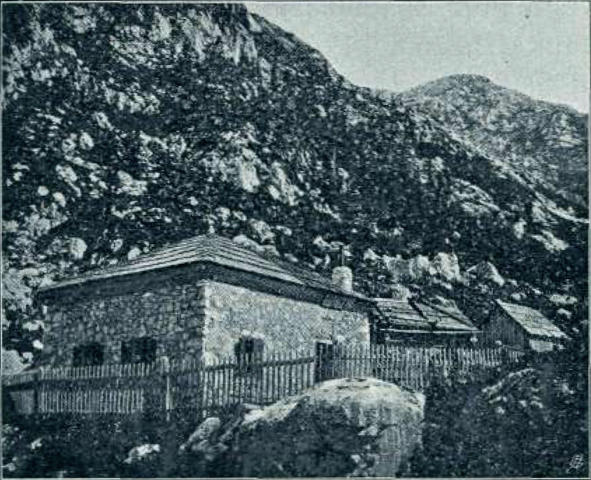 Frischaufova koča